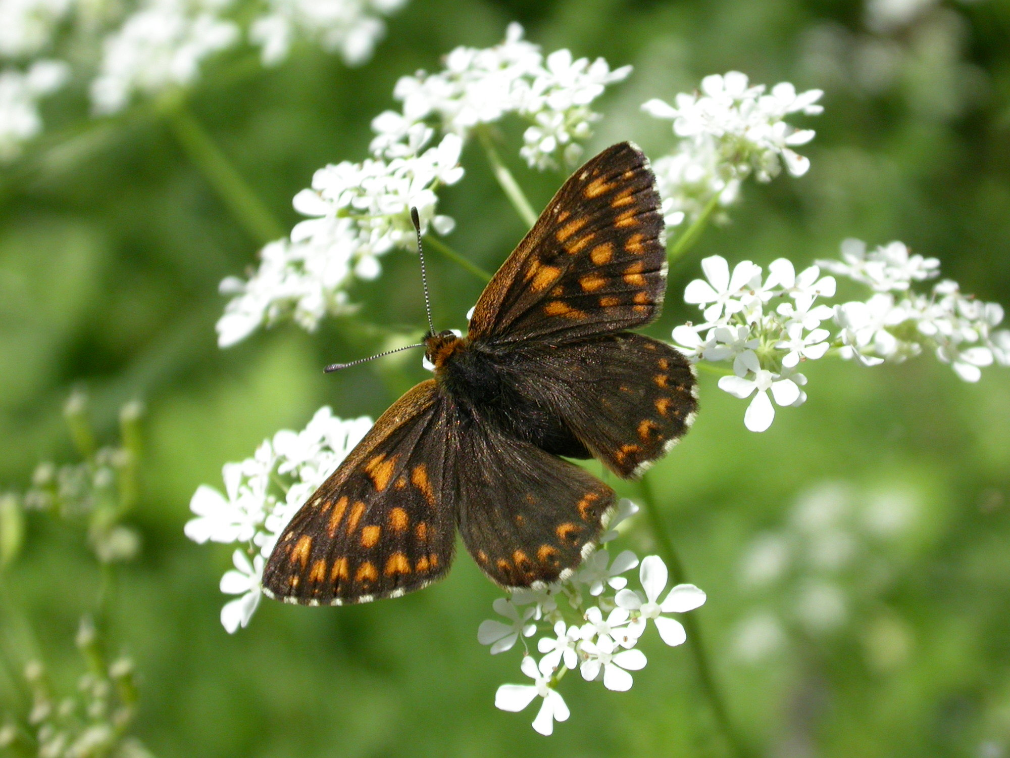 Hamearis lucina (Riodinidae). La Chaux-de-Fonds, Switzerland.